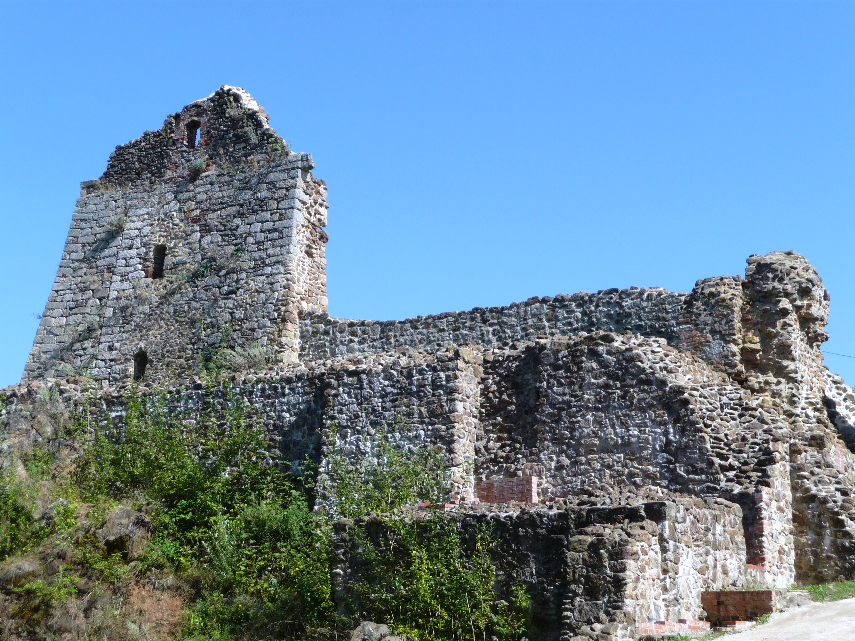 Gebäude der Burgruine Runding